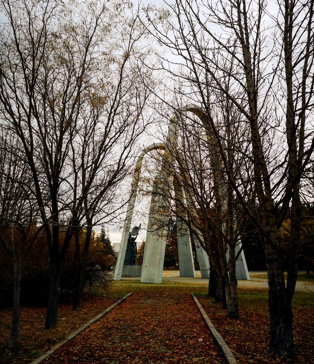 Hacettepe Üniversitesi Beytepe Kampüsü